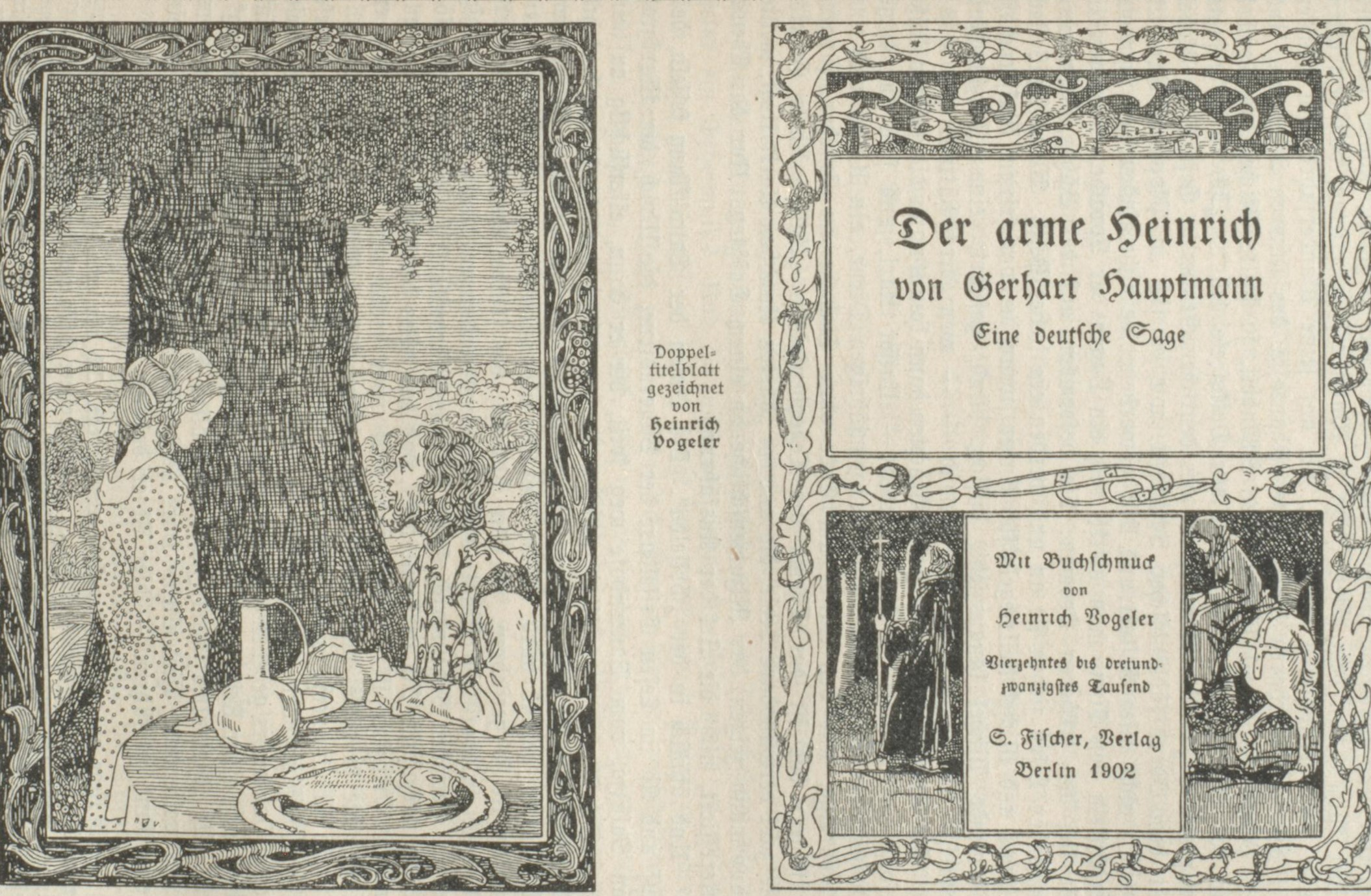 Heinrich Vogeler Gerhart Hauptmann Der arme Heinrich 1902